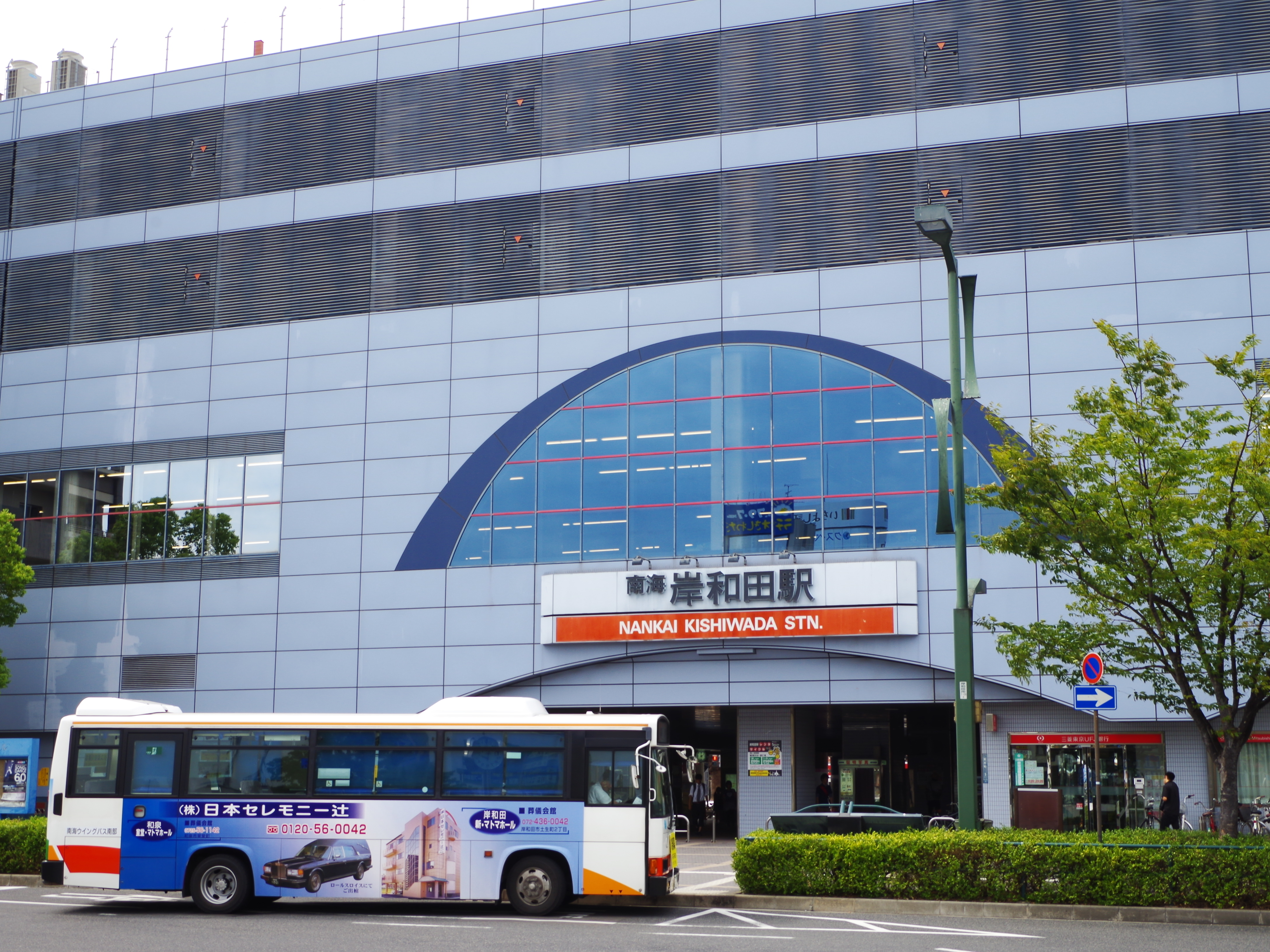 南海本線 岸和田駅(東出口) Kishiwada station 2013.8.29